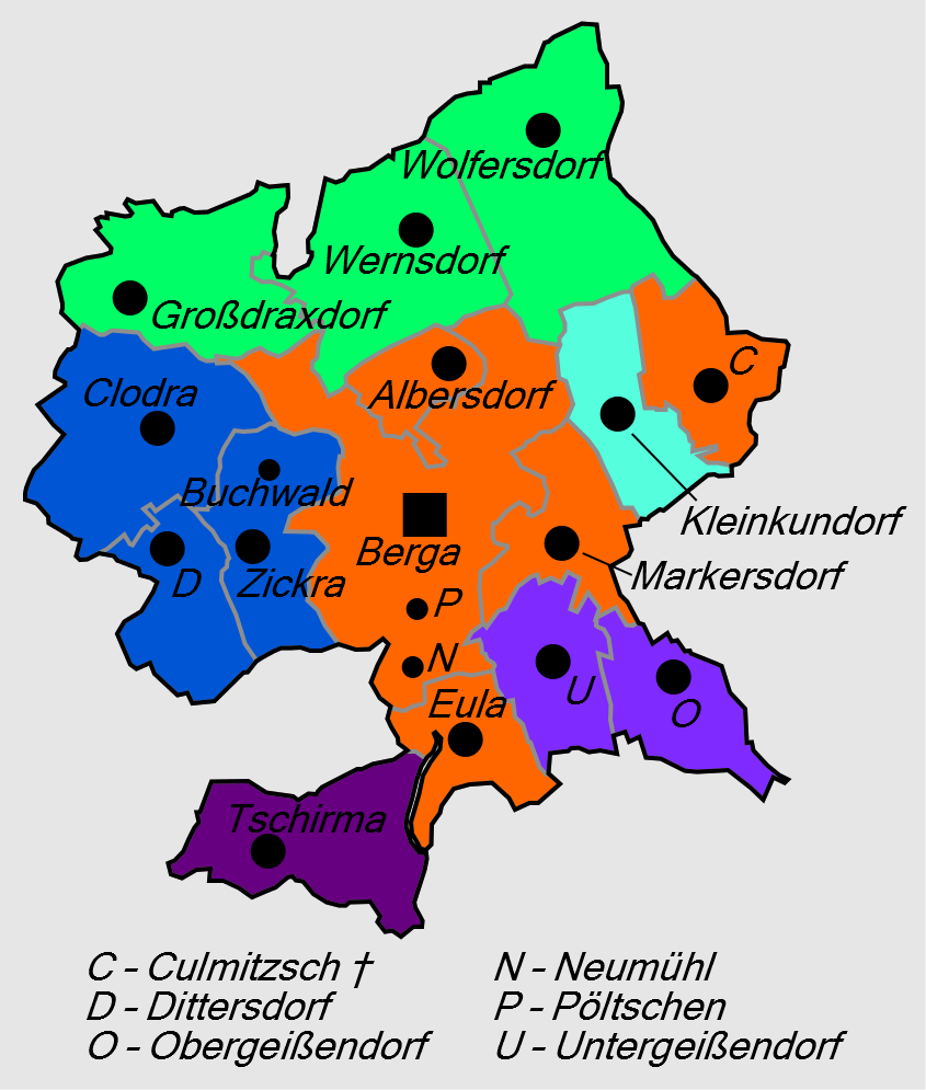 Gliederung der Stadt Berga/Elster ab 1. Januar 1974